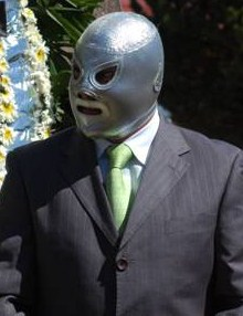 Hijo del Santo en una Rueda de prensa.